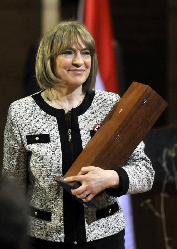 Kovács Kati átveszi a Kossuth-díjat a Parlamentben, 2014. március 14-én!